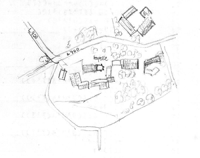 Hof Iben, Lageplan (Handskizze nach google)